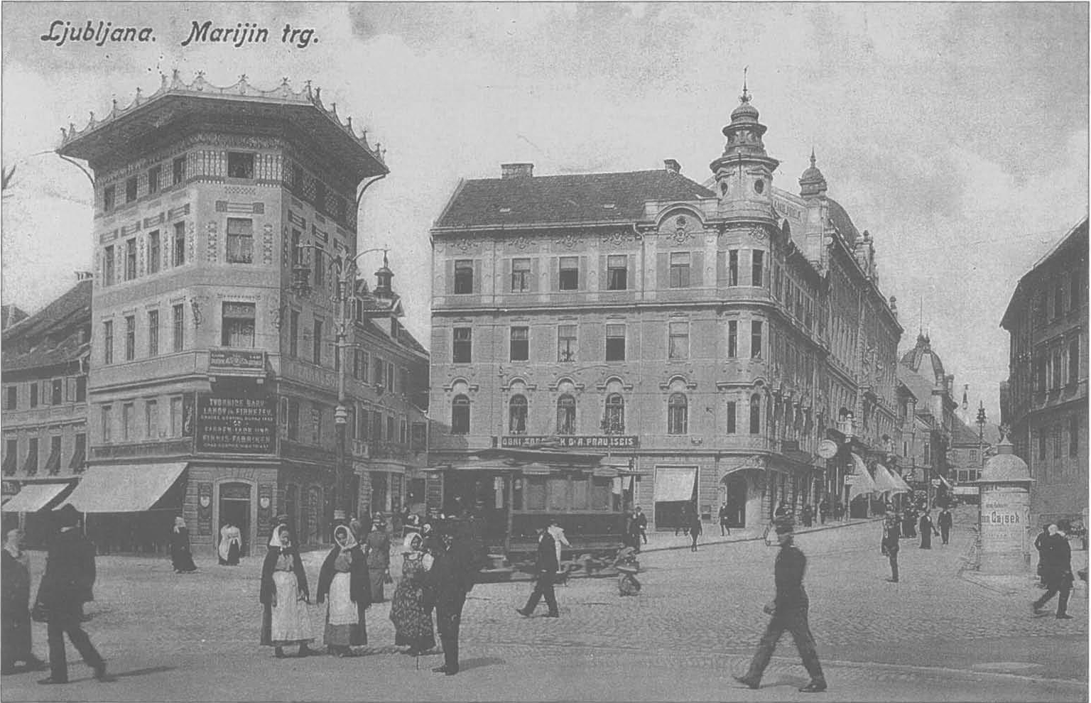 Prešernov trg proti Čopovi in Wolfovi